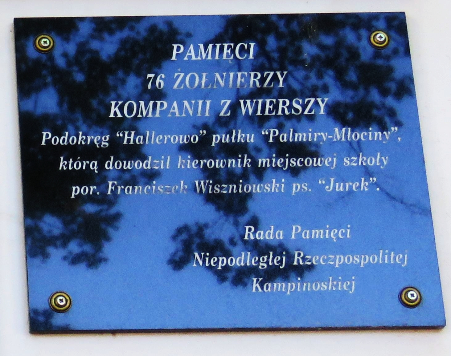 WIERSZE Kościół p.w. Św. Maksymiliana Marii Kolbe TABLICA NA KOŚCIELE 11